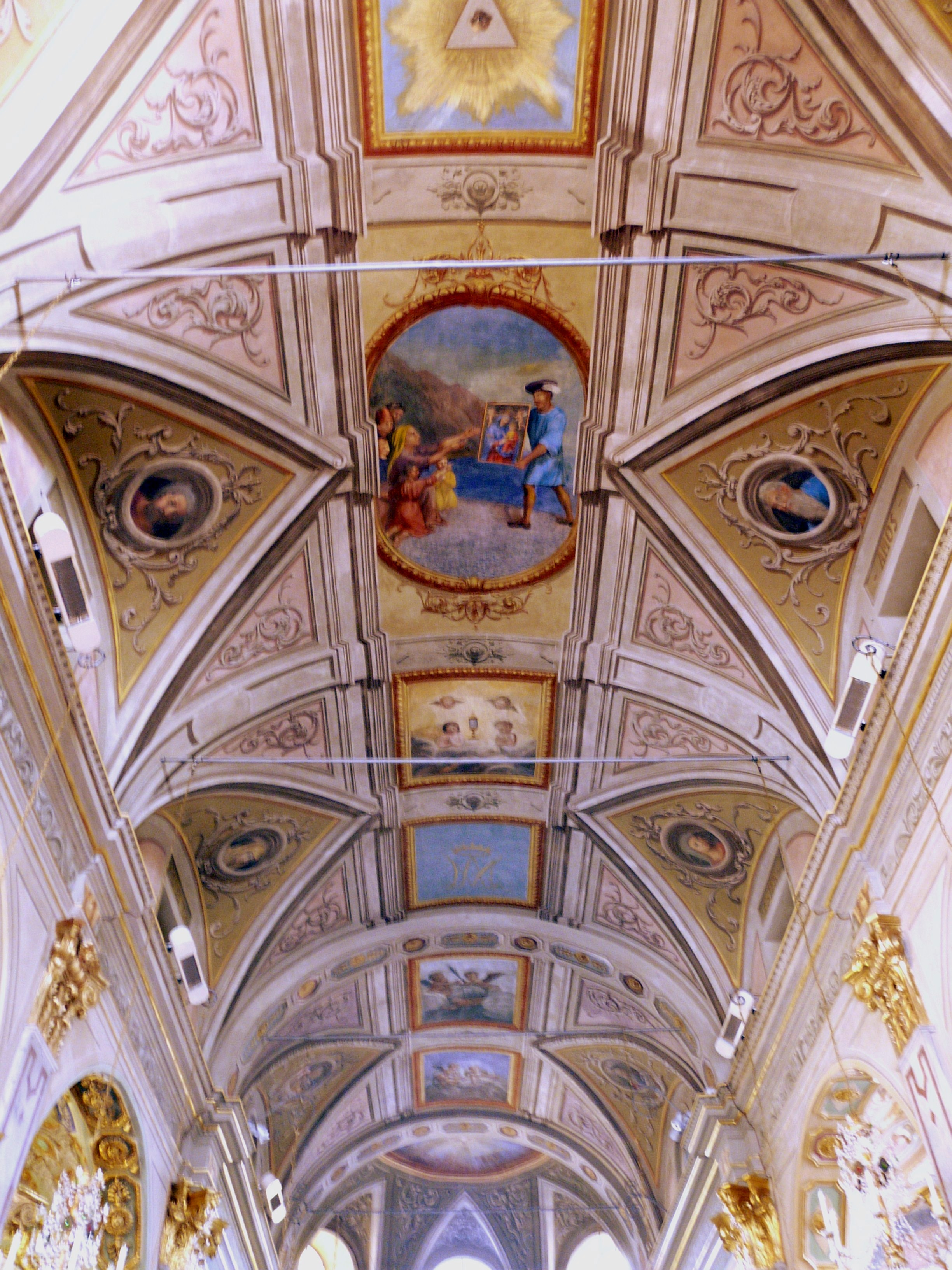 Santuario di Nostra Signora delle Grazie di Megli, Recco, Liguria, Italia